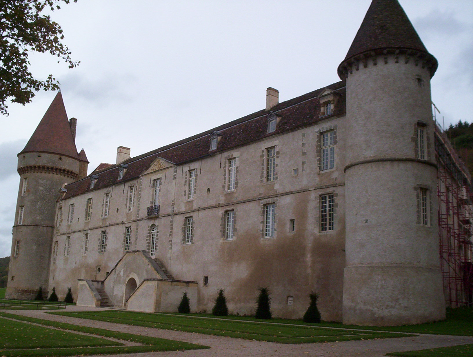 Château de Bazoches (Château de Vauban), Bazoches, Bourgogne, FRANCE.